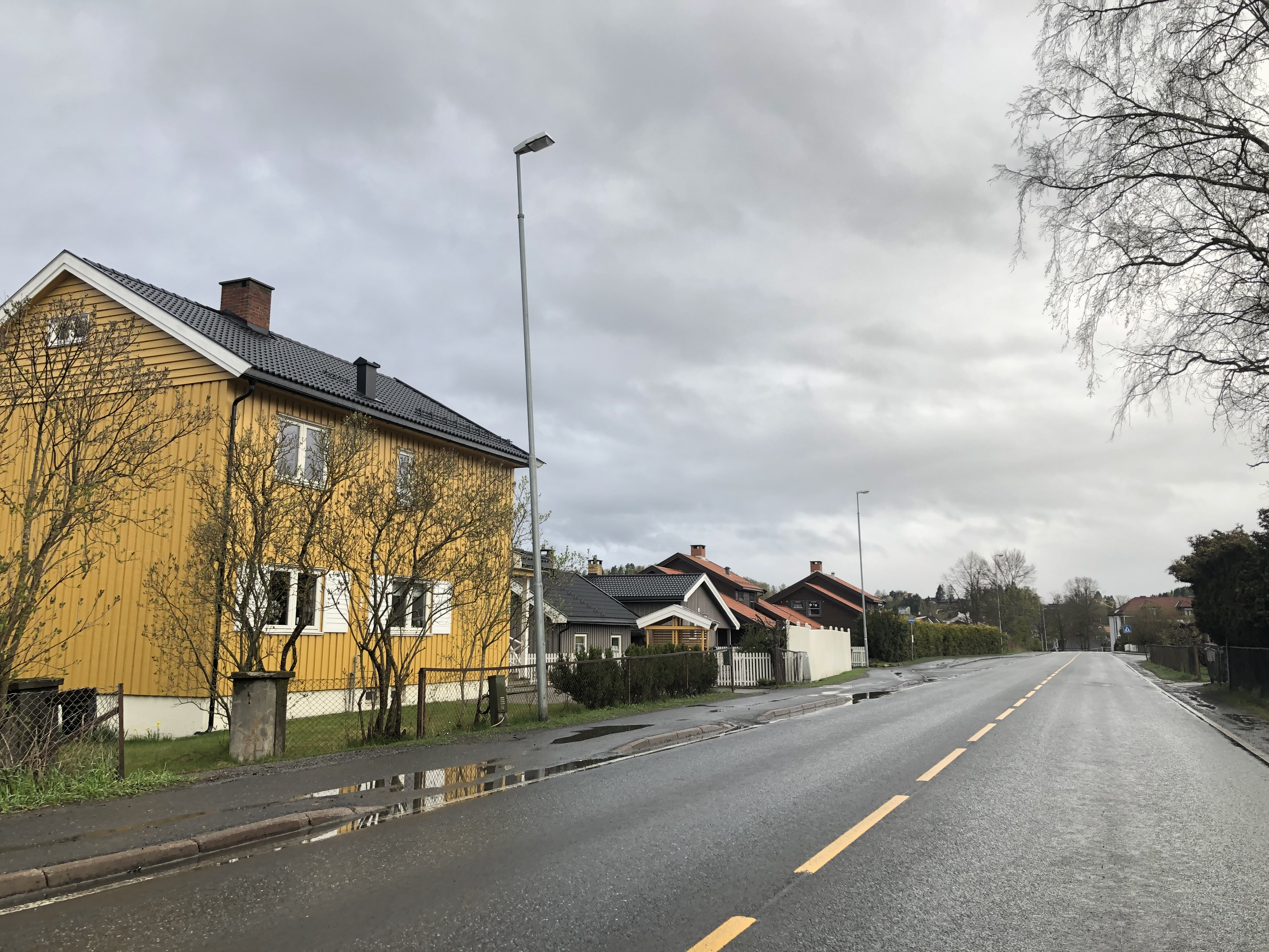 Ole Thorkelsens vei, Ringerike